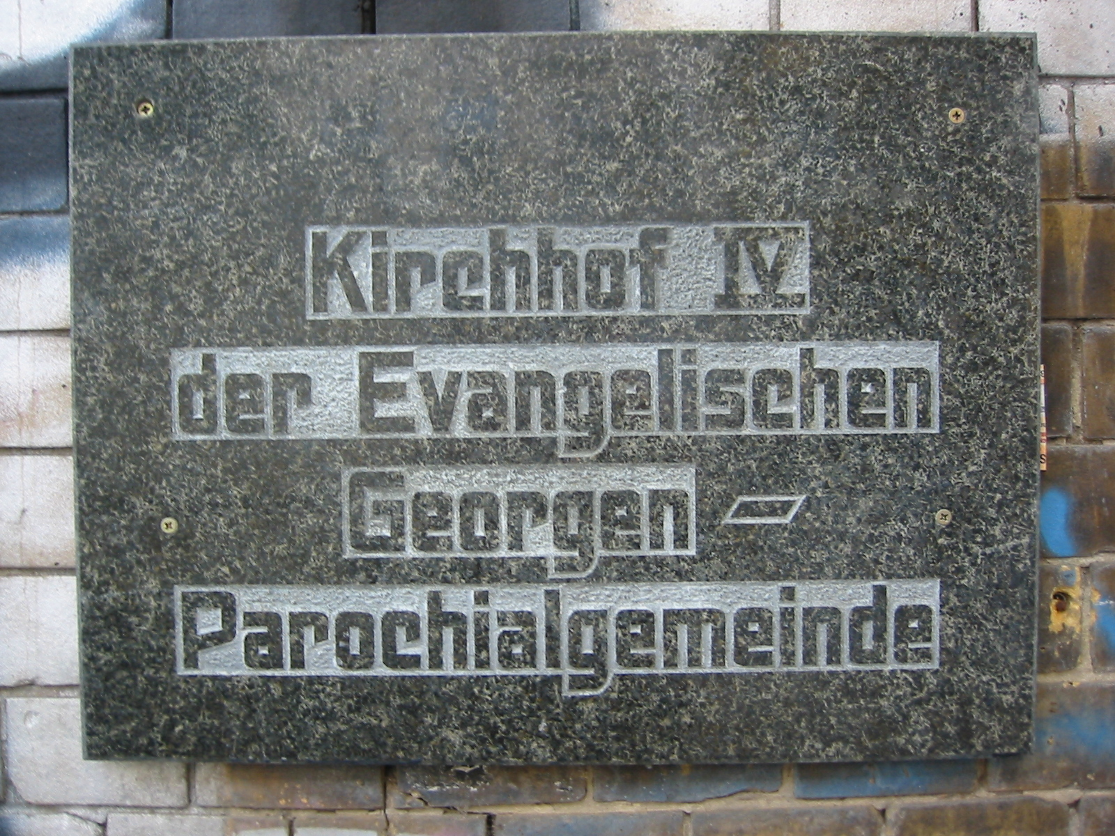 Georgen-Parochial-Friedhof IV, Boxhagener Strasse, Berlin